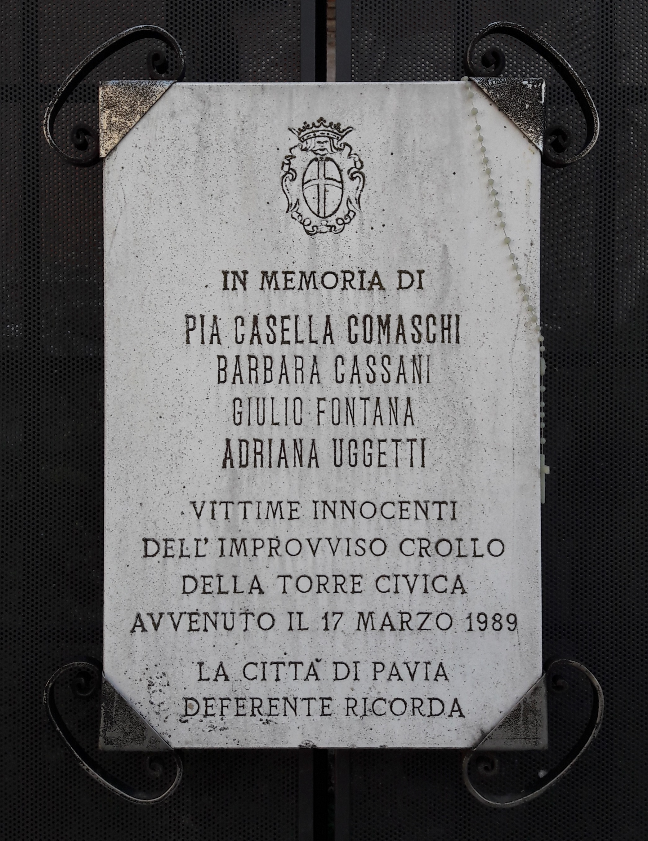 Pavia - Torre Civica - Targa commemorativa vittime This is a photo of a monument which is part of cultural heritage of Italy.